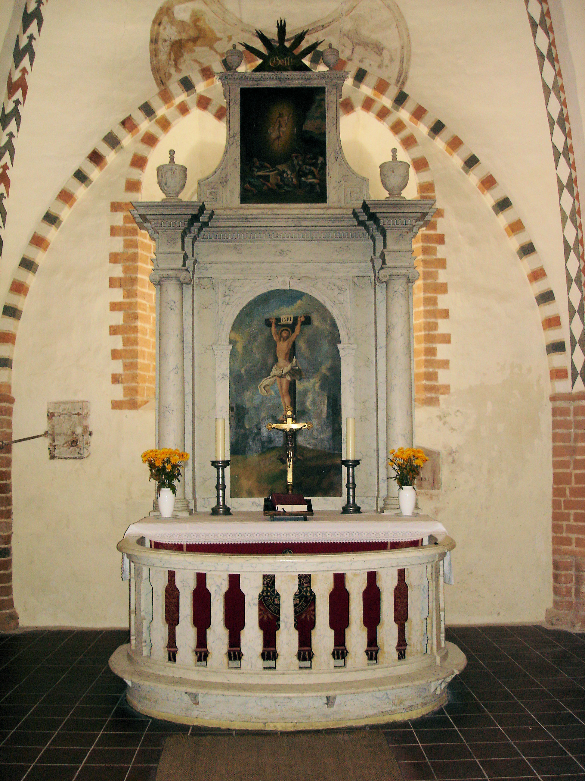 Kirche Lambrechtshagen, Altar / Church in Lambrechtshagen, altar (Mecklenburg-Western Pomerania)